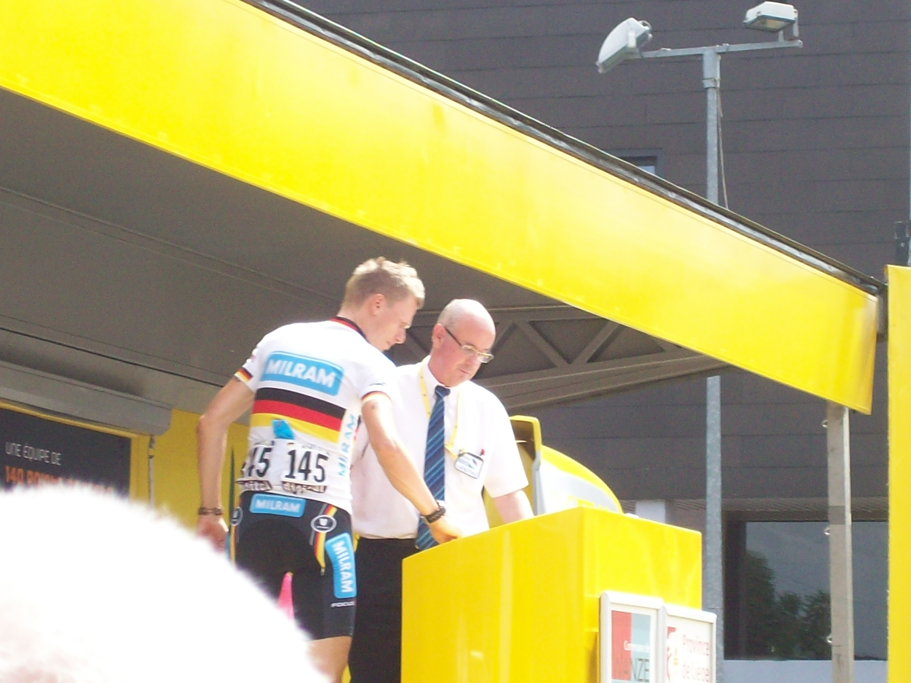 Christian Knees au départ de la 3e étape du Tour de France 2010 à Wanze, province de Liège, Belgique.